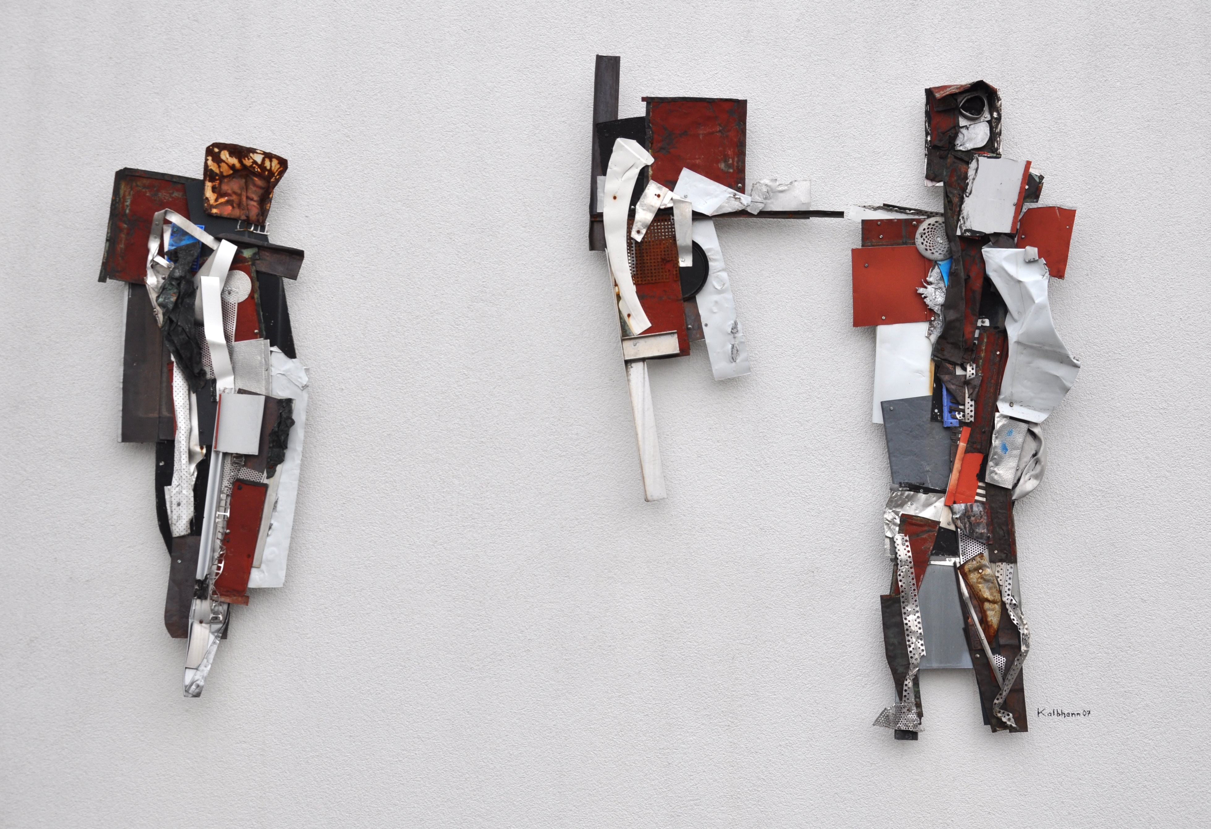 Weingarten (Württemberg), Körperbehinderten-Zentrum Oberschwaben, Mensa, Skulptur von Horst Kalbhenn (2007)